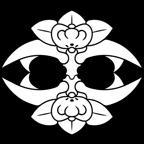 「根割り橘」紋（染抜）